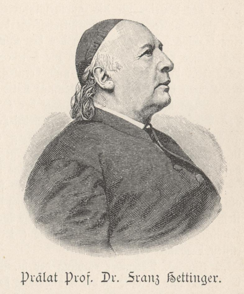 Prof. Dr. Franz Hettinger, Würzburg